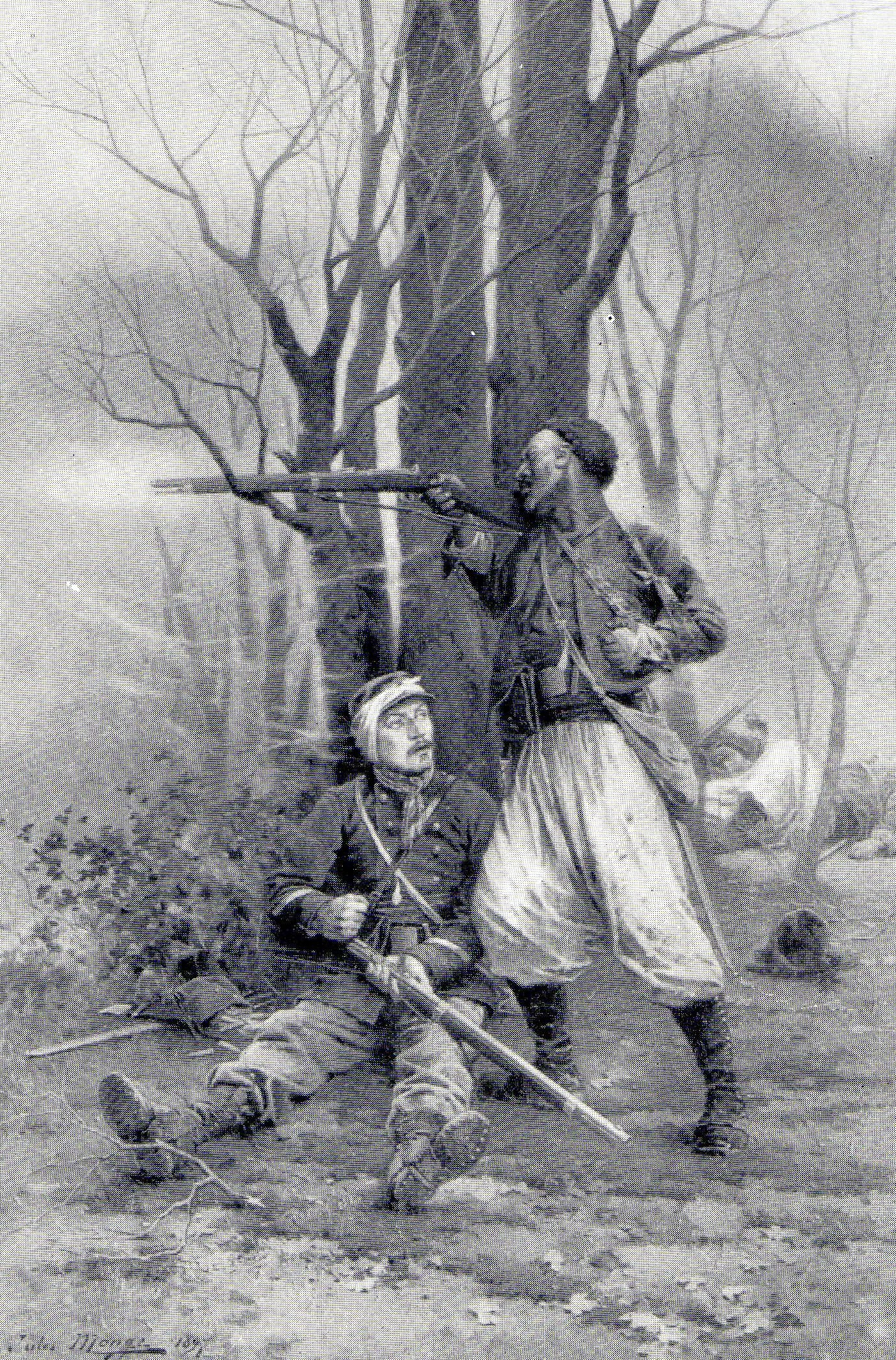 Le Turco Ben-Kadour à Lorcy (bataille de Beaune-la-Rolande - 1870), tableau de Jules Monge